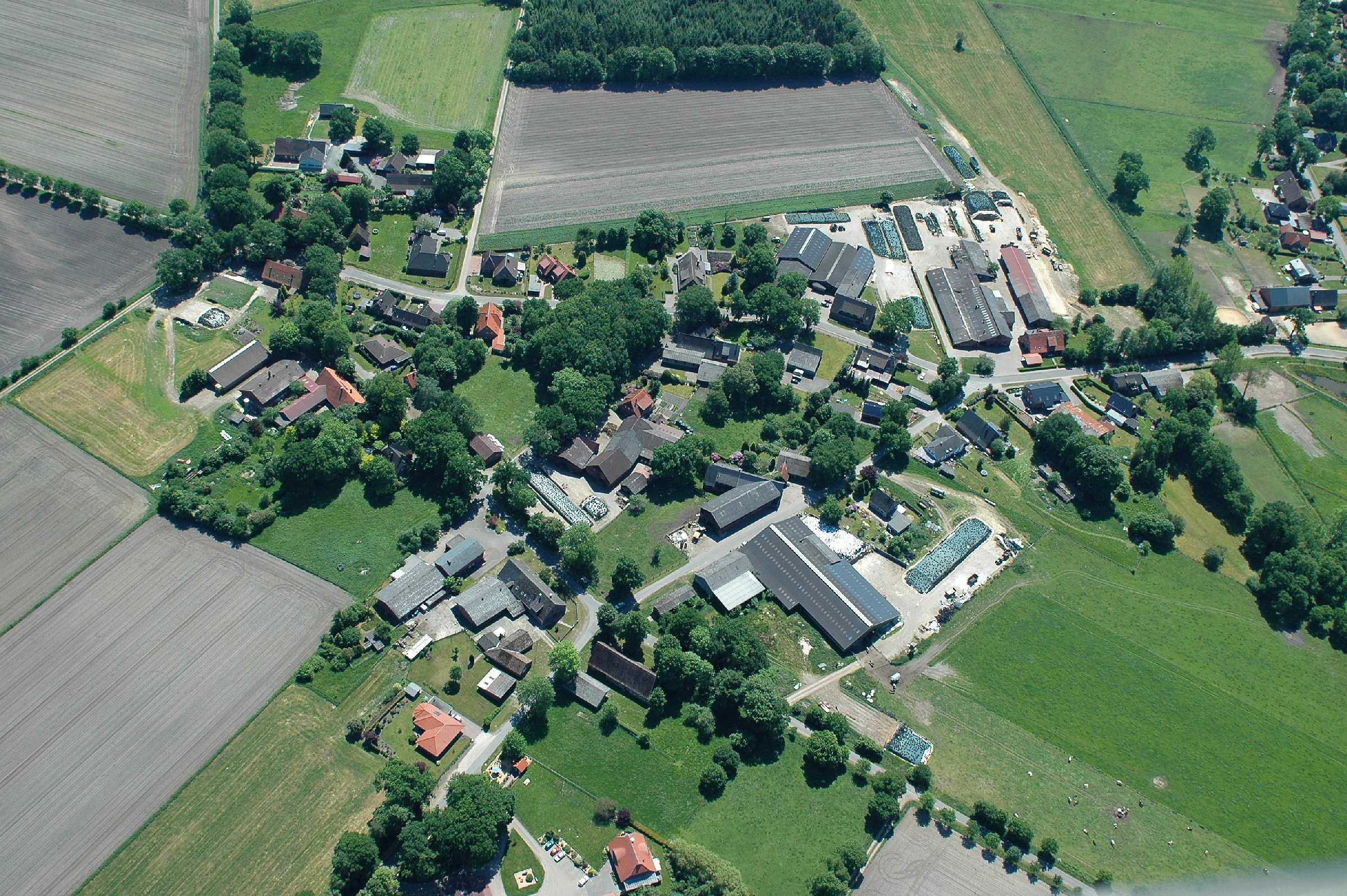 Luftbild von Alfstedt bei Kührstedt. Im Hintergrund die Hauptstraße, von links unten kommend der Brookhornsweg. Aus Serie: Fotoflug vom Flugplatz Nordholz-Spieka über Cuxhaven und Wilhelmshaven